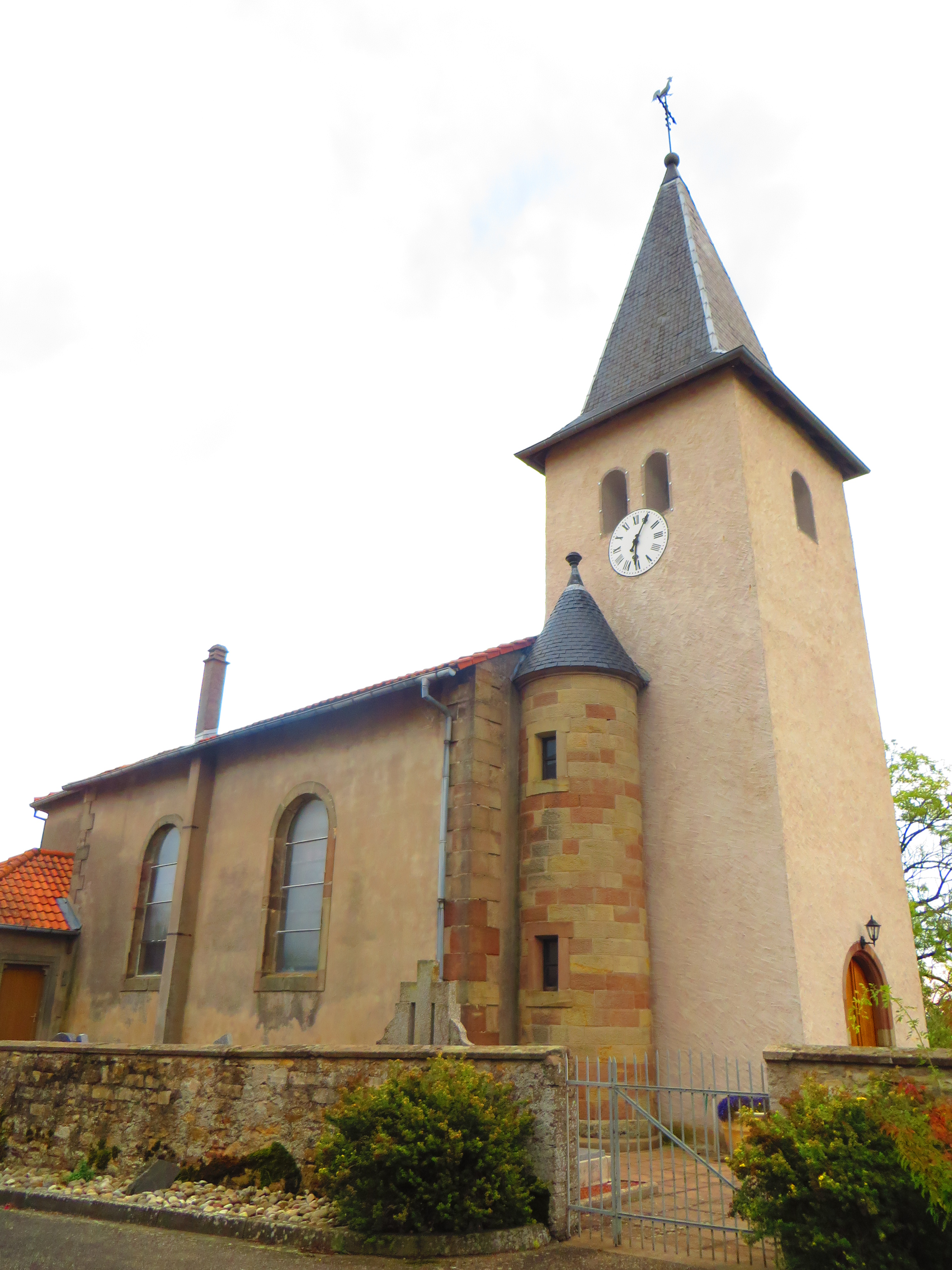 Lostroff Église Saint-Nicolas